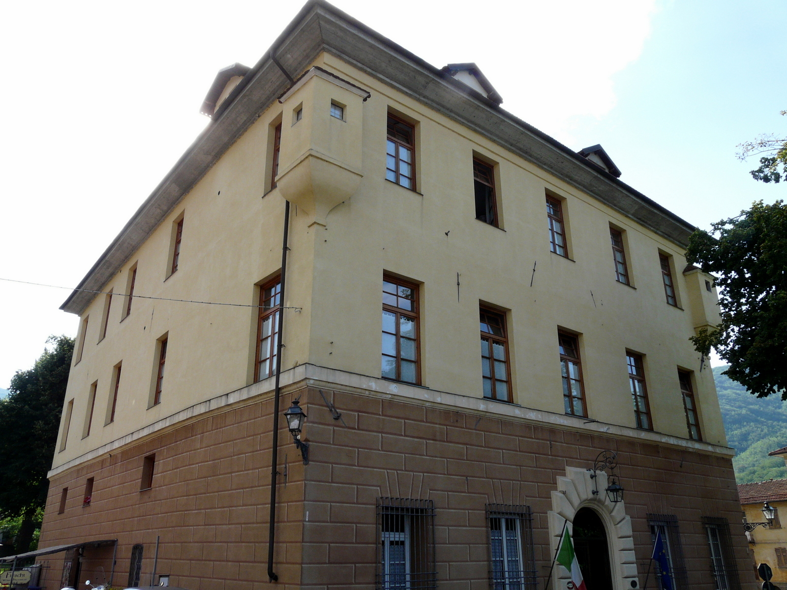 Palazzo Fieschi, Savignone, Liguria, Italia